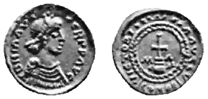 Denar König Chlotar I. Abbildung aus Deutsche Kultur des Mittelalters in Bild und Wort von Dr. Paul Herre, Verlag von Quelle & Meyer in Leipzig 1912. Leistungsschutzrechte erloschen. Lizenz: Public Domain.